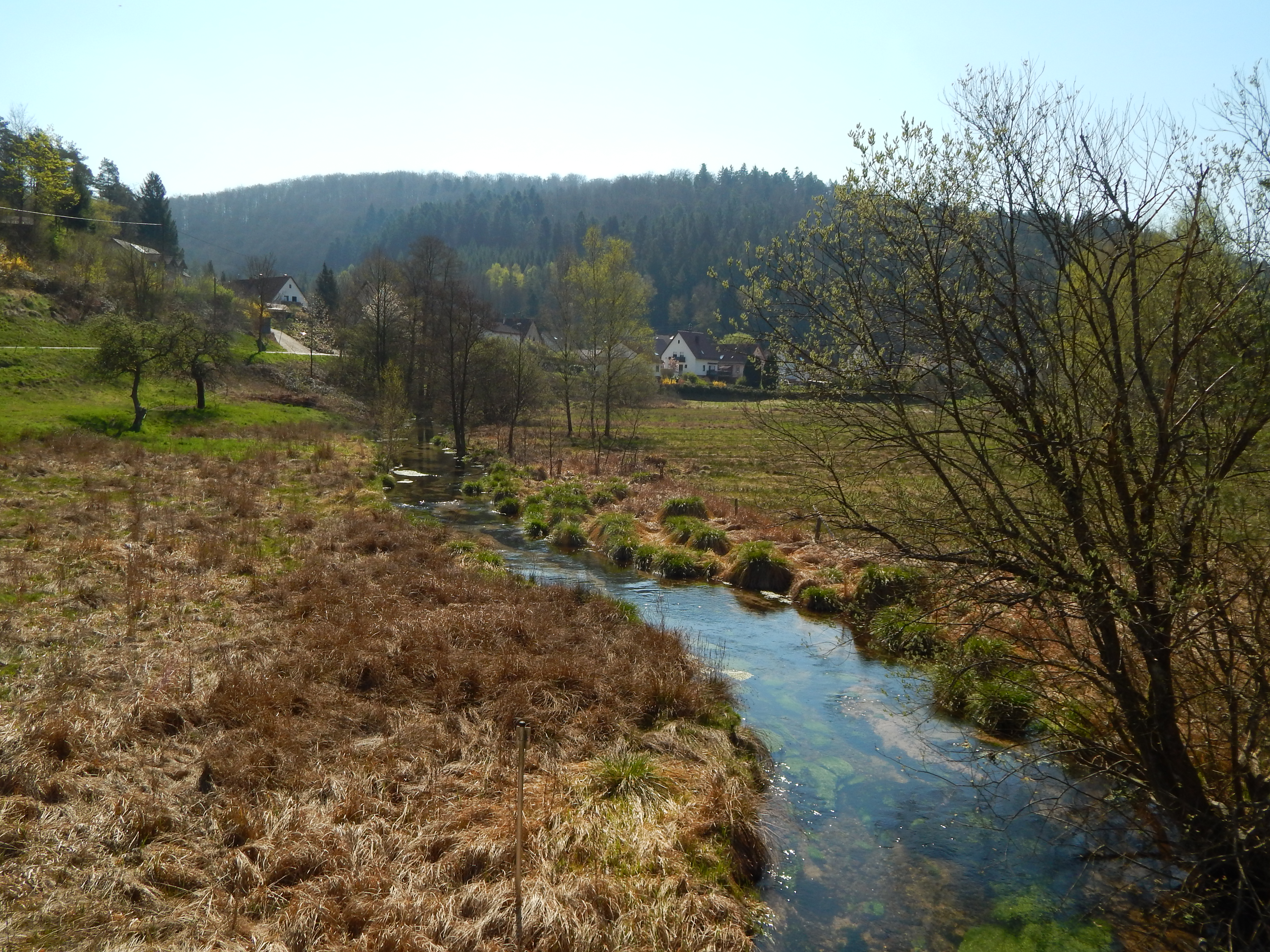 Bach bei Salzwoog (Biosphärenreservat Pfälzer Wald)